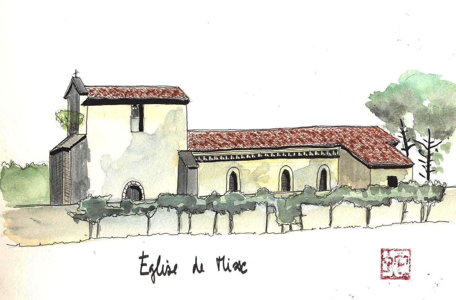 Aquarelle de l'église de Mixe sur la commune de Lit-et-Mixe dans le département français des Landes.